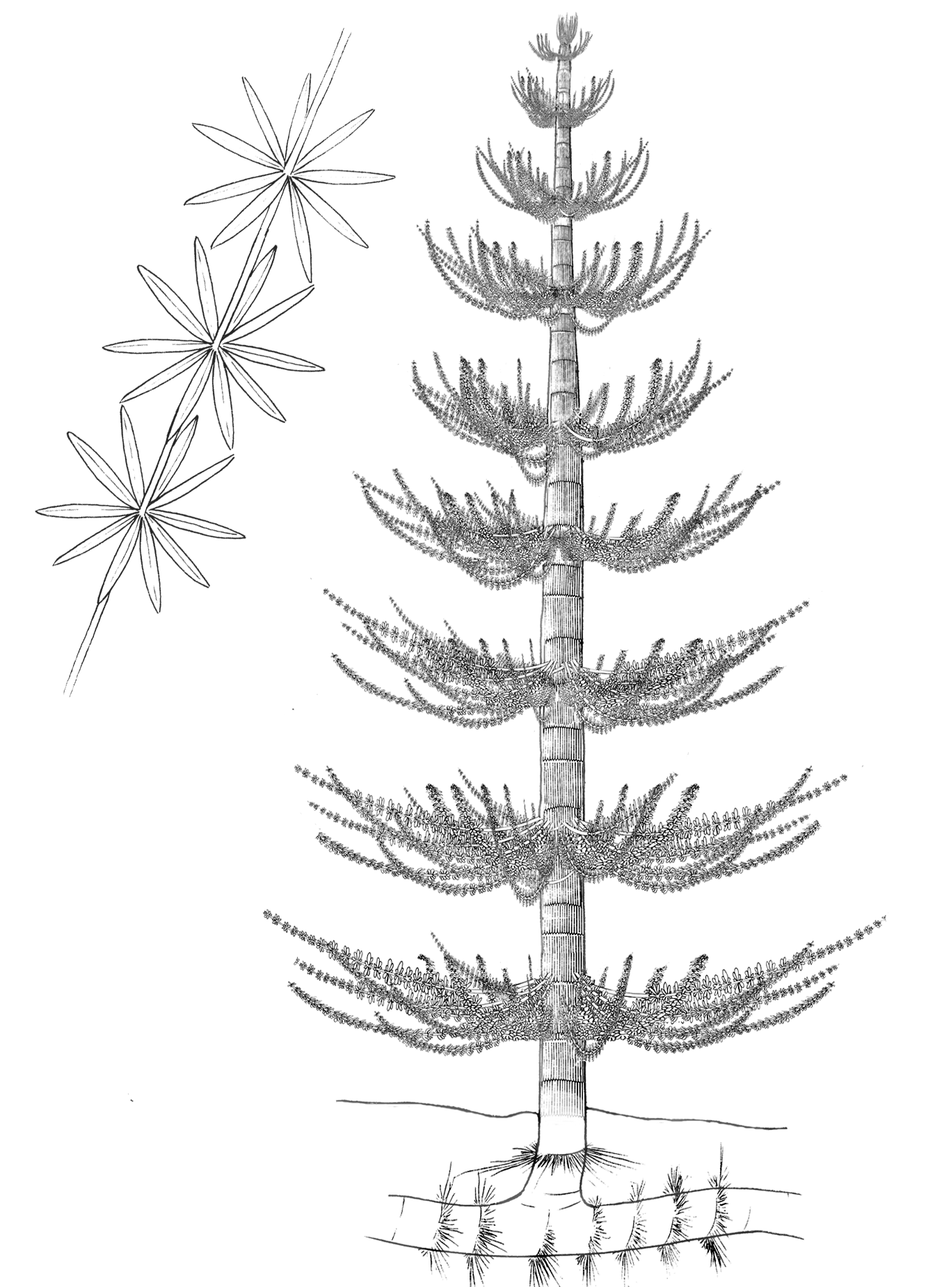 Reconstrucción del vegetal fósil Calamites a partir de los restos fósiles conocidos y detalle de susus hojas, Annularia.